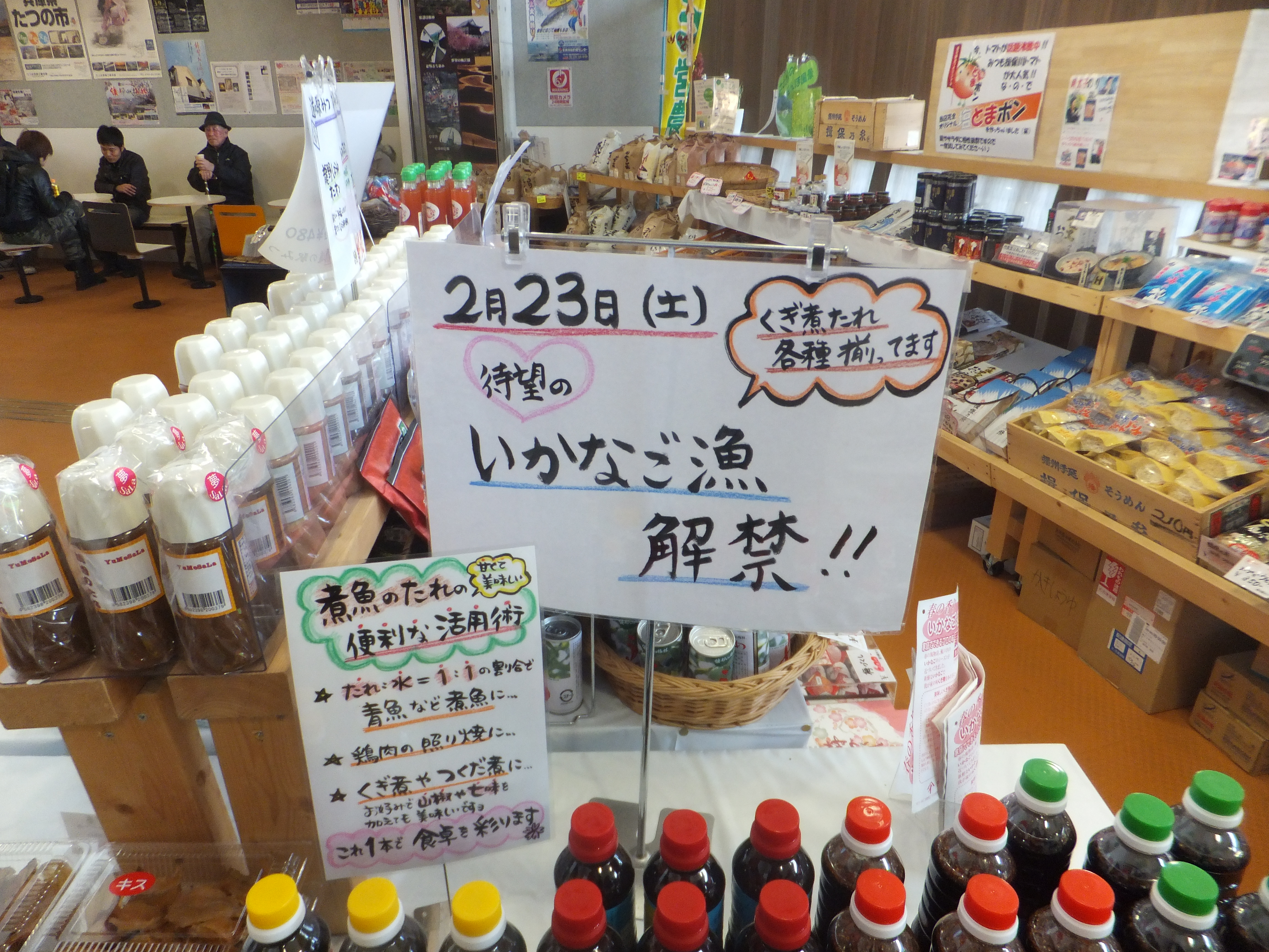 いかなご漁の解禁を知らせる情報